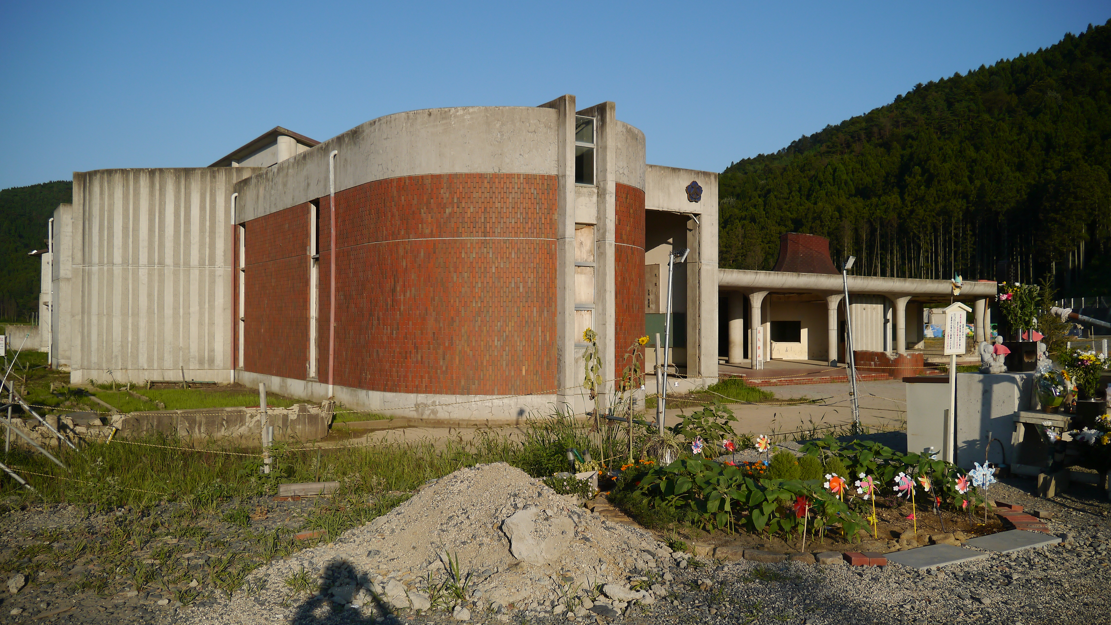 石巻市立大川小学校